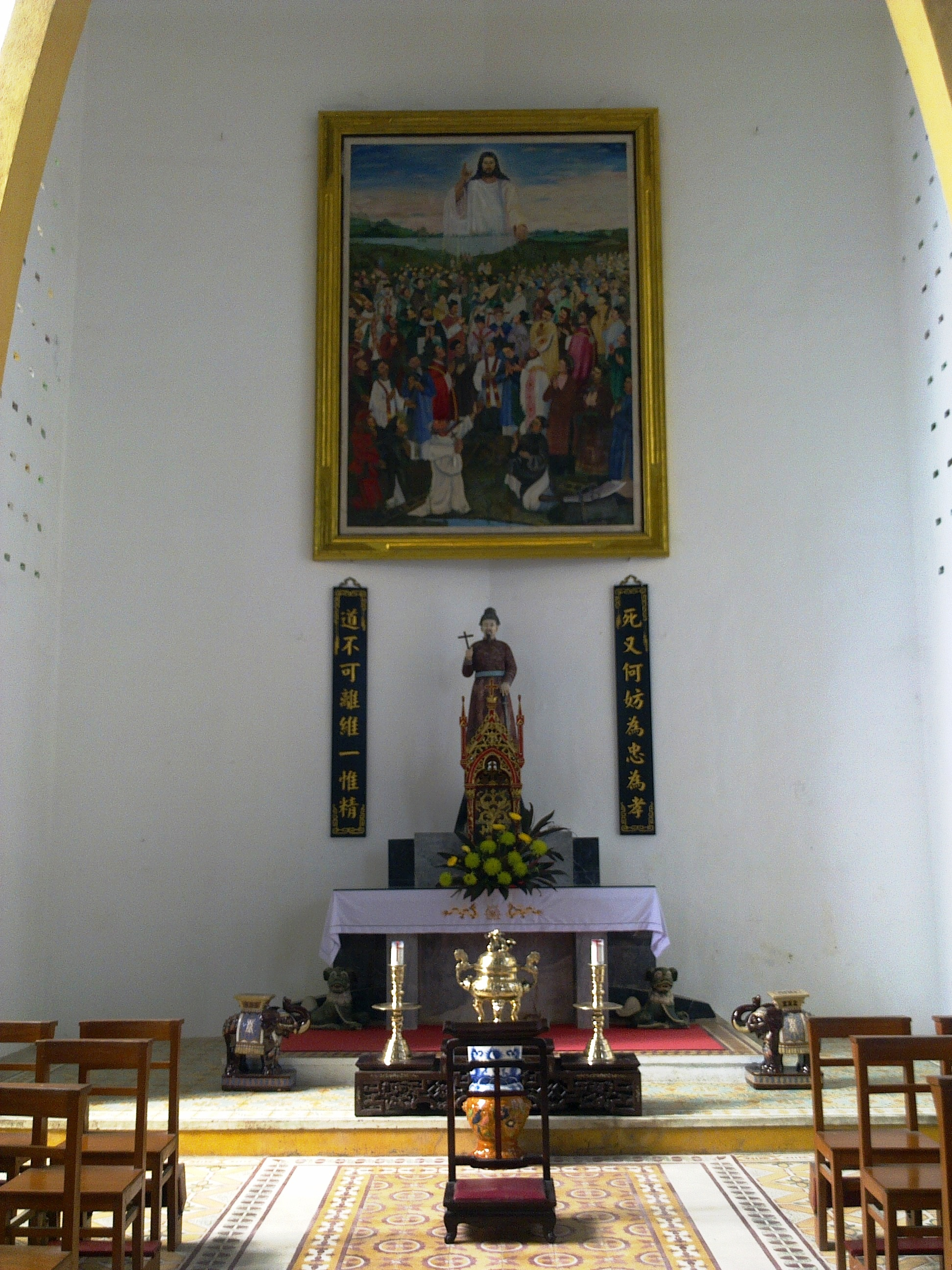 Nơi thờ Phaolô Tống Viết Bường tại Nhà thờ chính tòa Phủ Cam, Huế. (Hai câu đối: Đạo bất khả ly duy nhất duy tinh. Tử hựu hà phường vi trung vi hiếu)